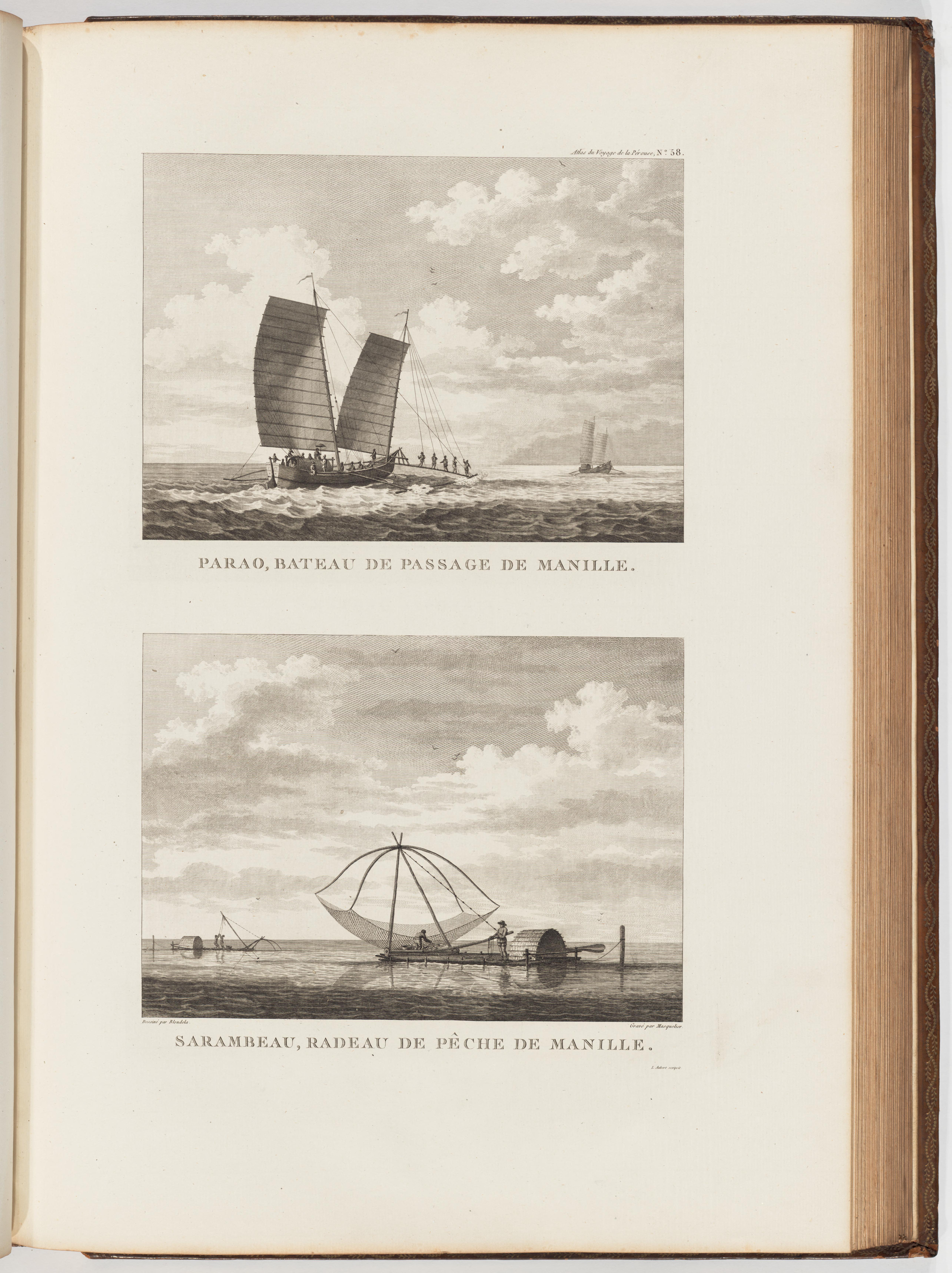 Voyage de La Pérouse autour du monde /publié conformément au décret du 22 avril 1791, et rédigé par L.A. Milet-Mureau.